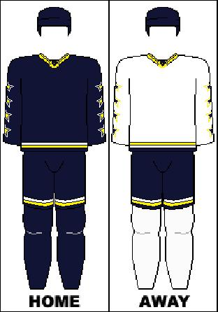 Hv71s matchställ